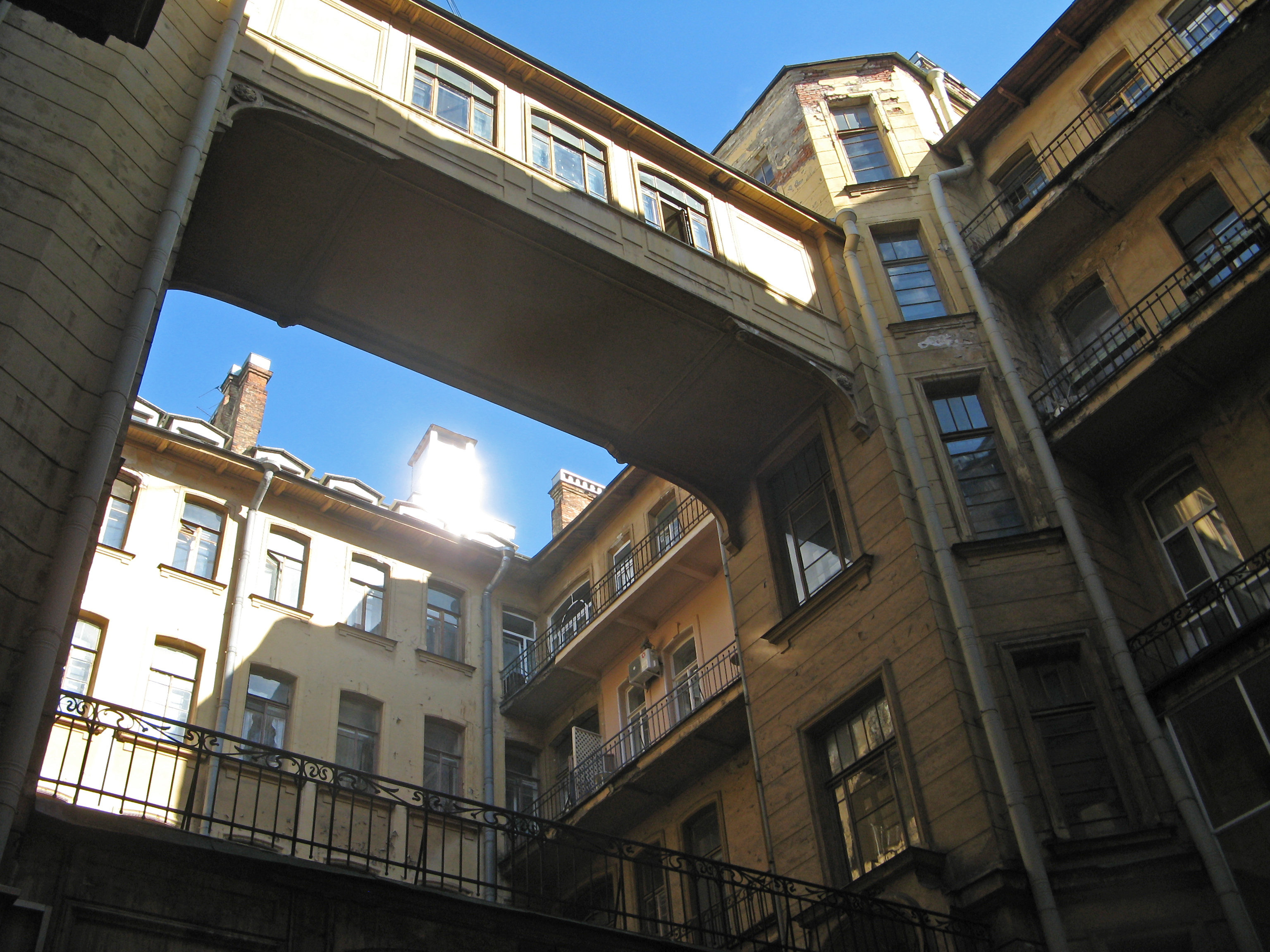 Доходный дом Ю.Б. Бака: Кирочная улица, 24, Центральный район, Санкт-Петербург